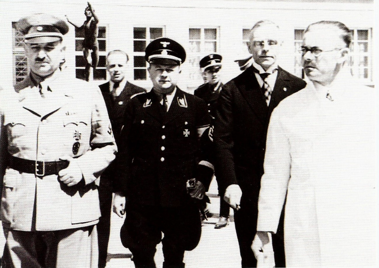 Reicherziehungsminister Bernhard Rust (links) mit dem württembergischen Wirtschaftsminister Oswald Lehnich (in Uniform SS-Oberführer, Mitte) zu Besuch in Tübingen mit dem Chirurgen Willy Usadel (rechts) hinter der Neuen Aula.